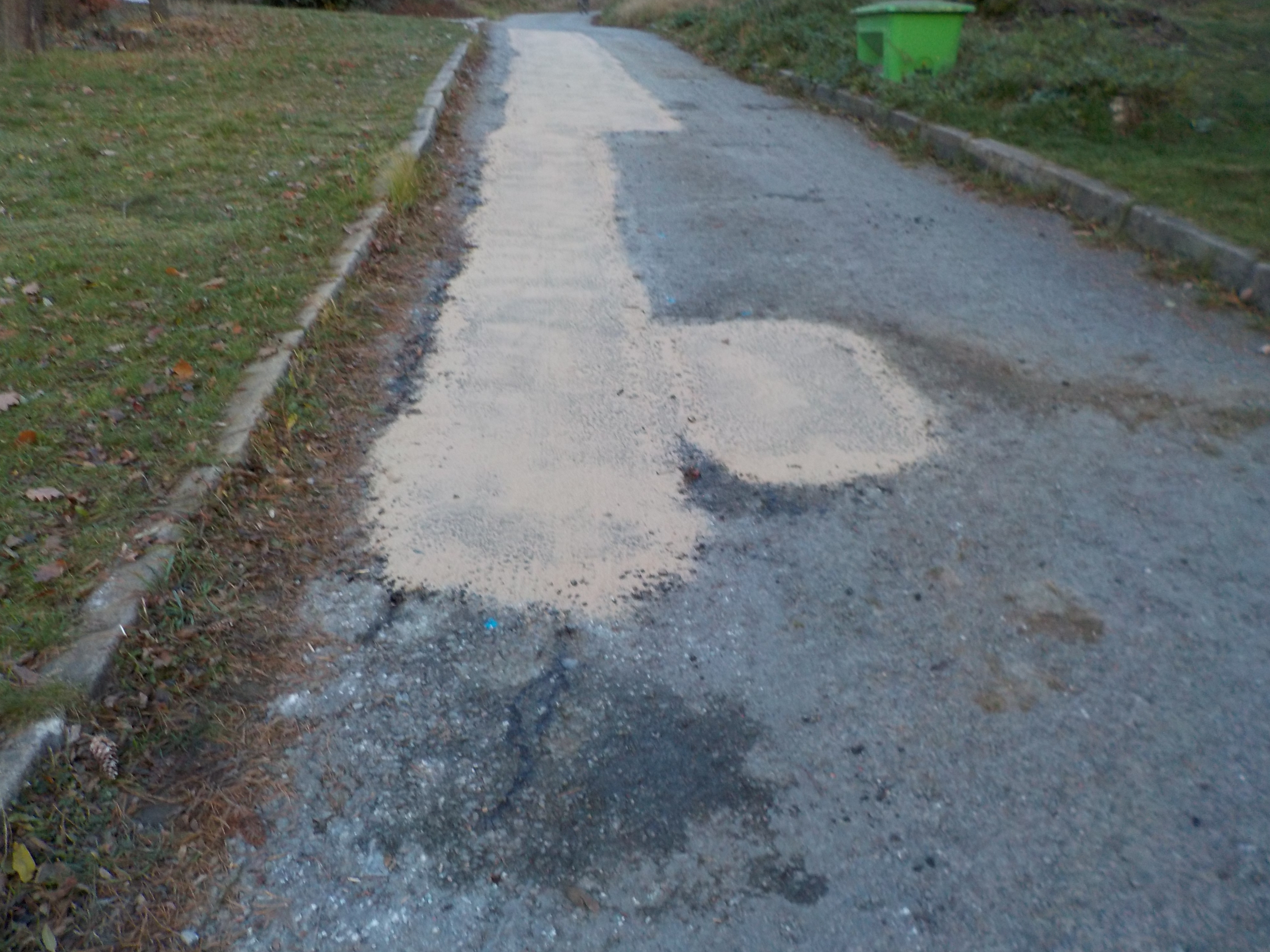 Opravená obecní cesta ve Křtinách.